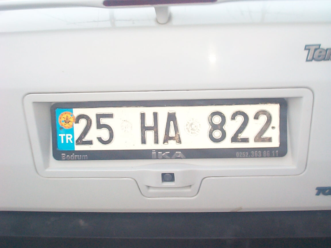 Ein türkisches Autokennzeichen